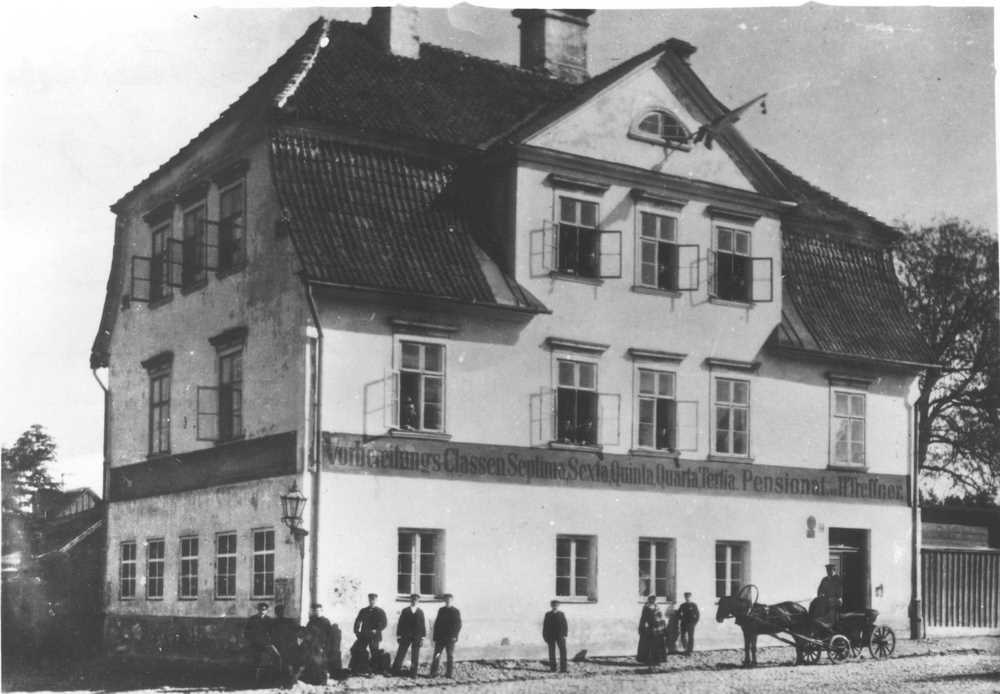 Hugo Treffneri Gümnaasiumi maja Tartus Hobuse tänaval 1895